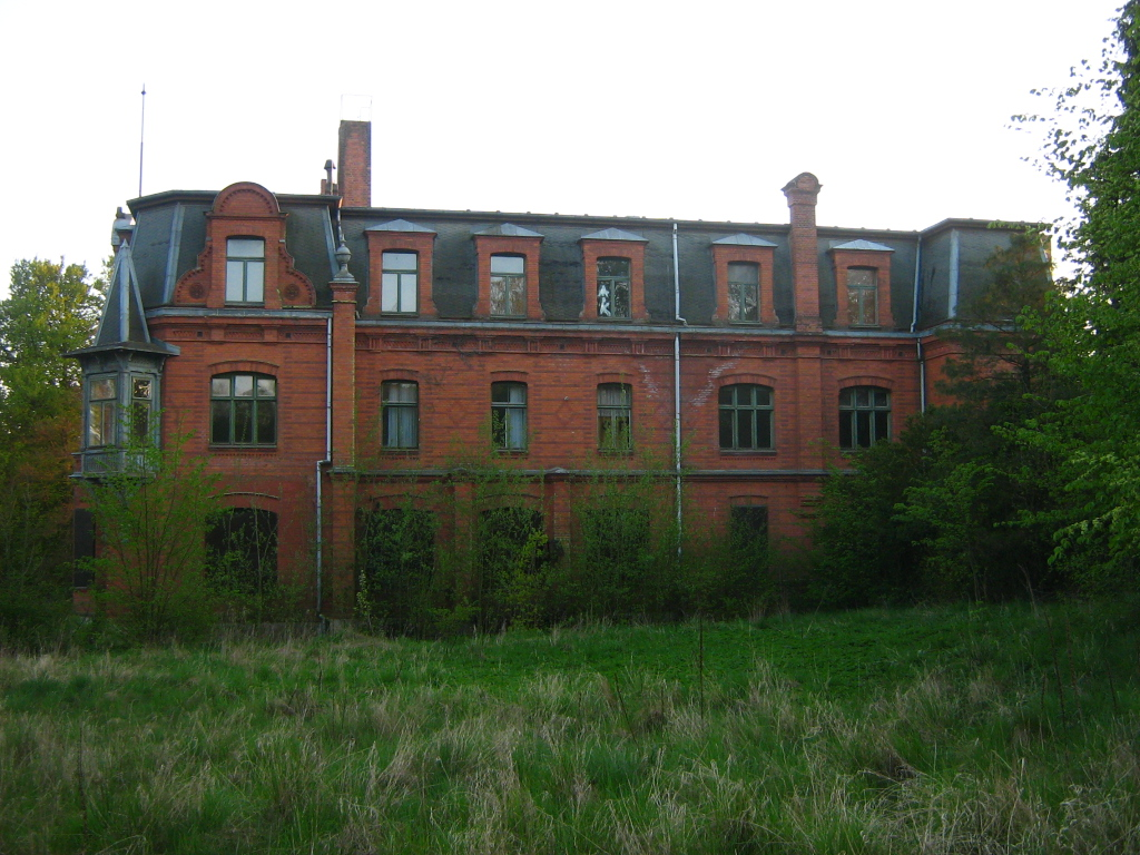 Das ehemalige Großherzogliche Schloss und die spätere Forstschule in Raben Steinfeld (Mecklenburg).